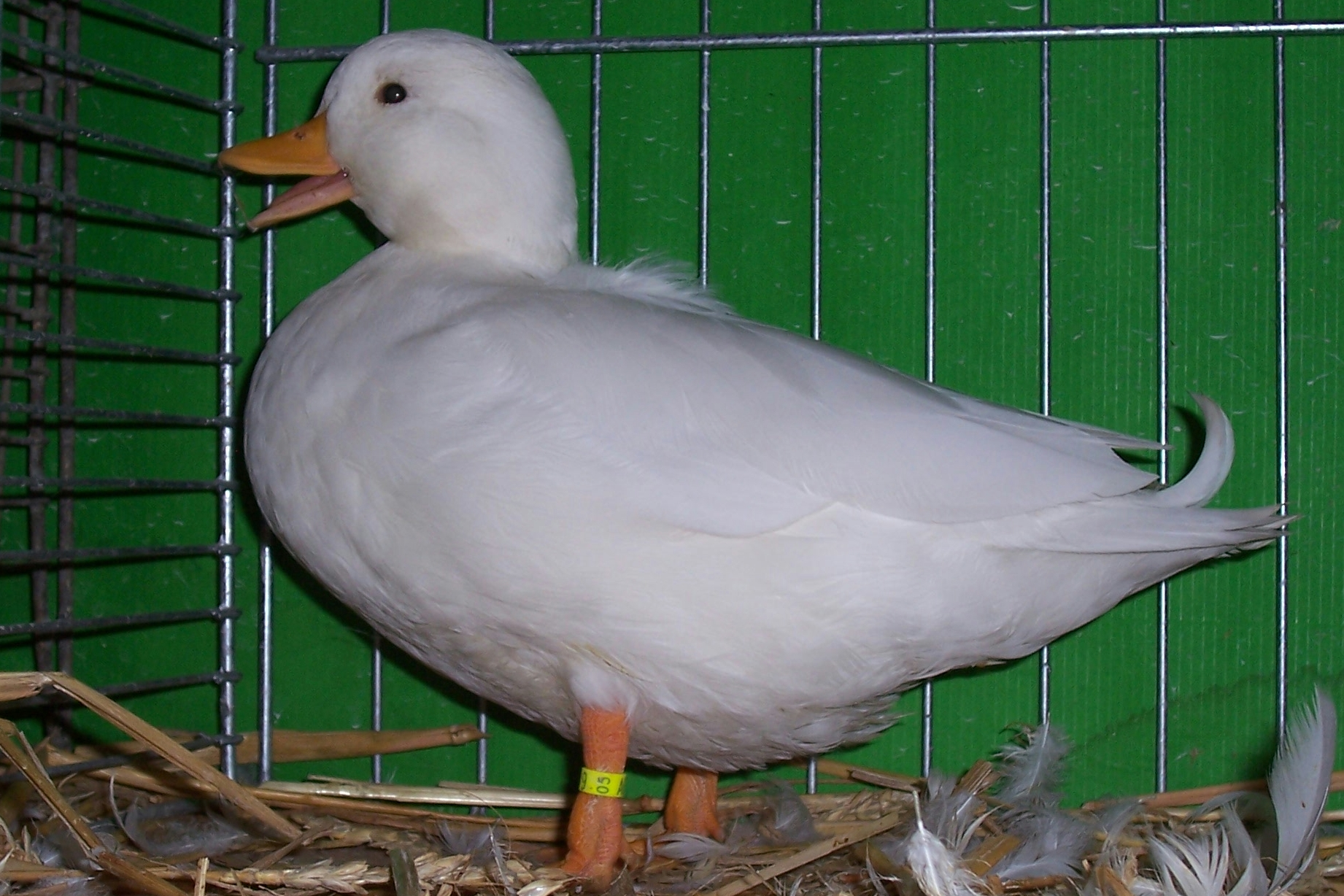 Zwergentenerpel